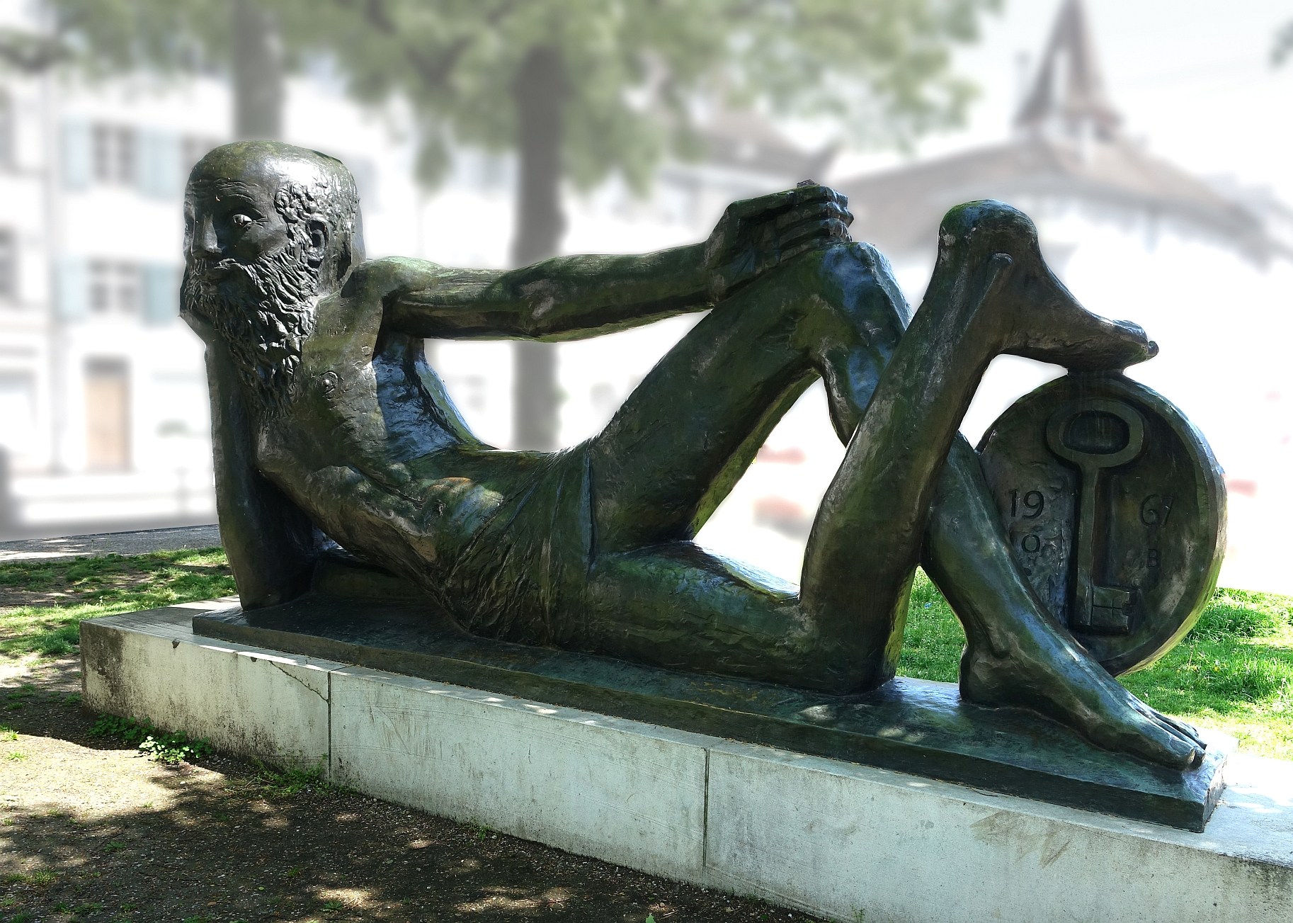 Otto Charles Bänninger (1897–1973) Bildhauer. Skulptur Janus, 1962, Standort auf dem Totentanz -Platz in Basel. 47° 33′ 42,17″ N, 7° 35′ 9,21″ E. Von 1929–1951 war er mit Bildhauerin Germaine Richier verheiratet.